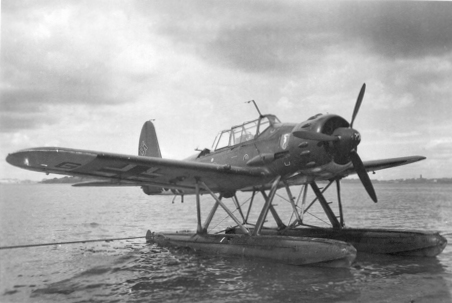 Arado 196, Kaukopartimiesten huoltokone, jota käytettiin sairaiden ja haavottuneiden evakoimiseen